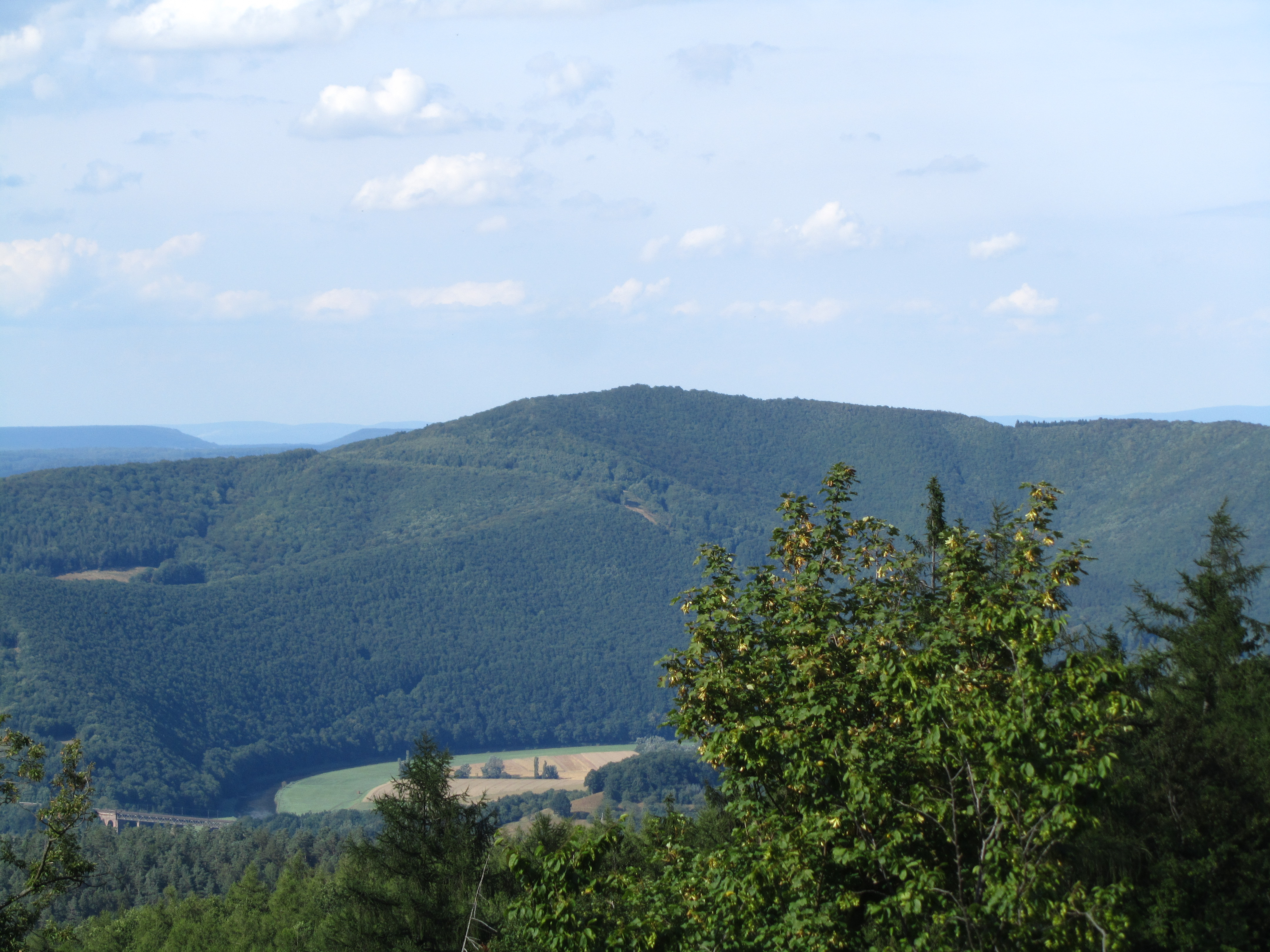 Blick vom Aussichtsturm auf dem Roßkopf im Soodener Bergland nach Norden zur Junkerkuppe (mit NSG Harthberg li, NSG Kelle-Teufelskanzel re), Eisenbahnbrücke bei Oberrieden im Werratal